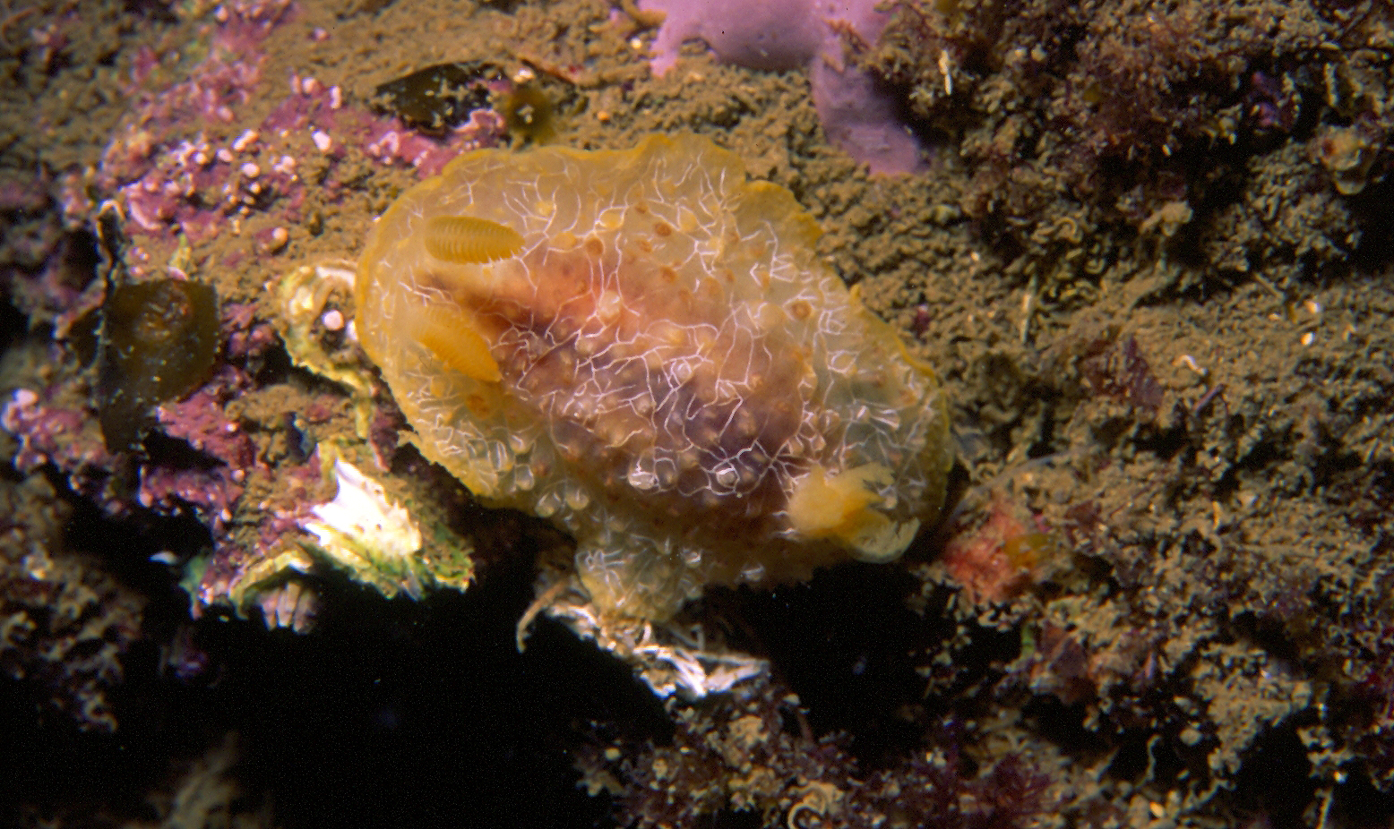 Doriopsilla areolata Bergh, 1880 - Banyuls-sur-Mer : 07/92